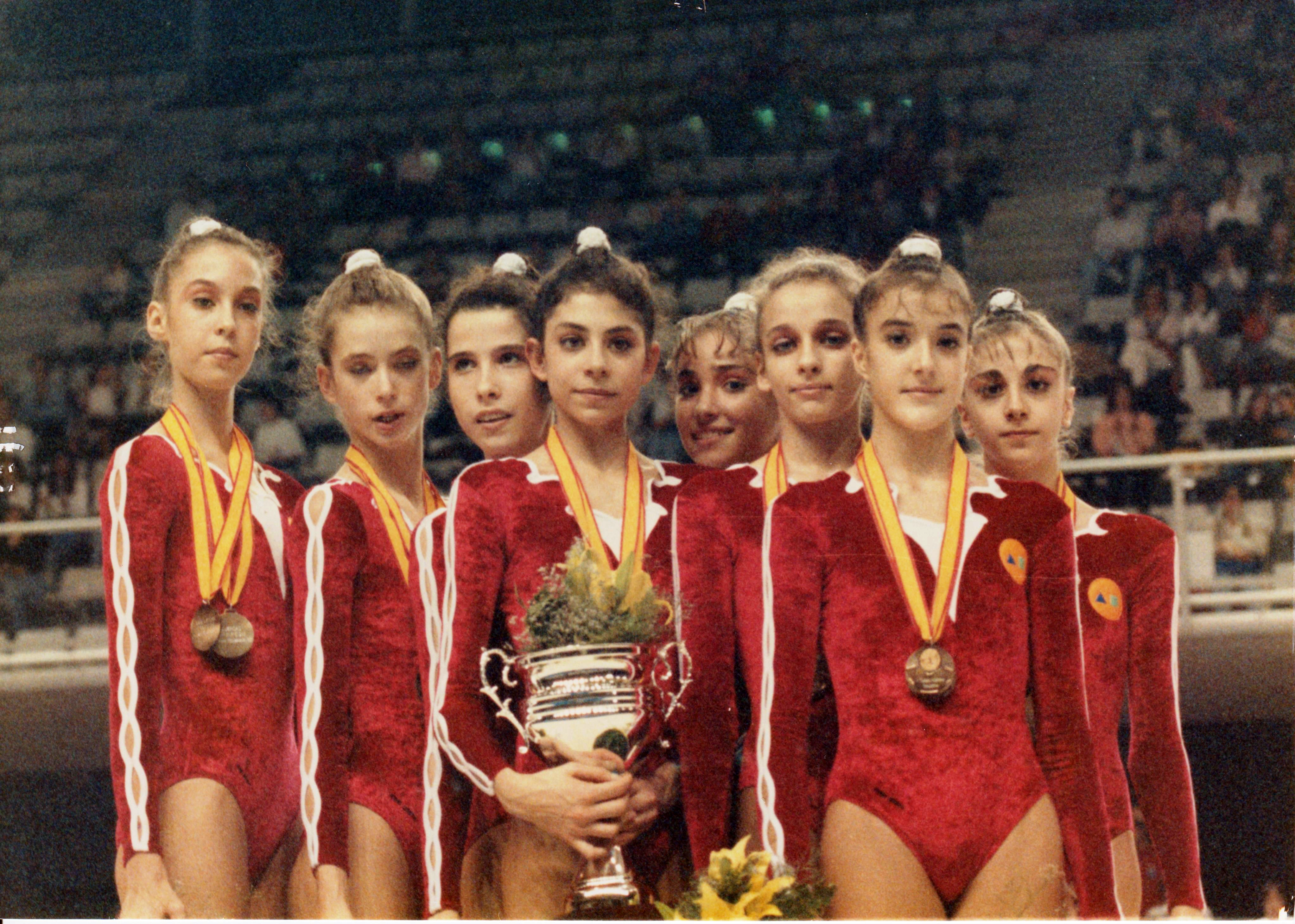 El conjunto español con dos oros en el podio del torneo Group Masters de Alicante en 1993. De izquierda a derecha: María Álvarez, Maider Olleta, Alicia Martín, Cristina Martínez, Paula Cobo, Regina Guati, Eva Velasco y Lorena Barbadillo. Foto facilitada por Alicia Martín.